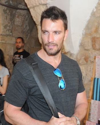 El actor Julian Gil durante su visita en Jerusalén en Mayo de 2015